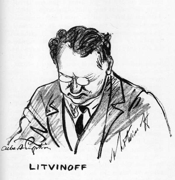 Maxim Litvinov, Maksim Litvinov, Макси́м Макси́мович Литви́нов